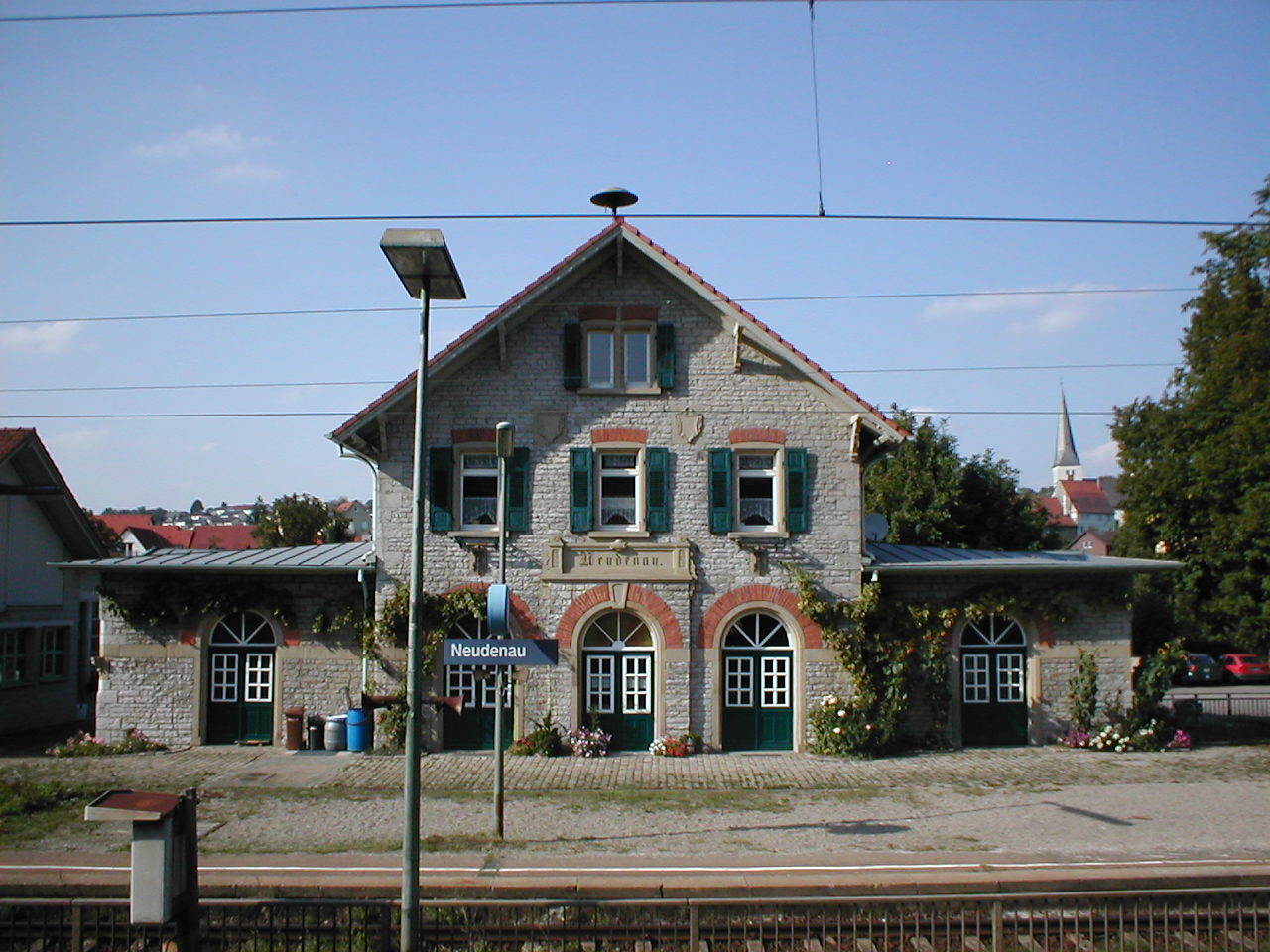 Bahnhof von Neudenau, Jagst.